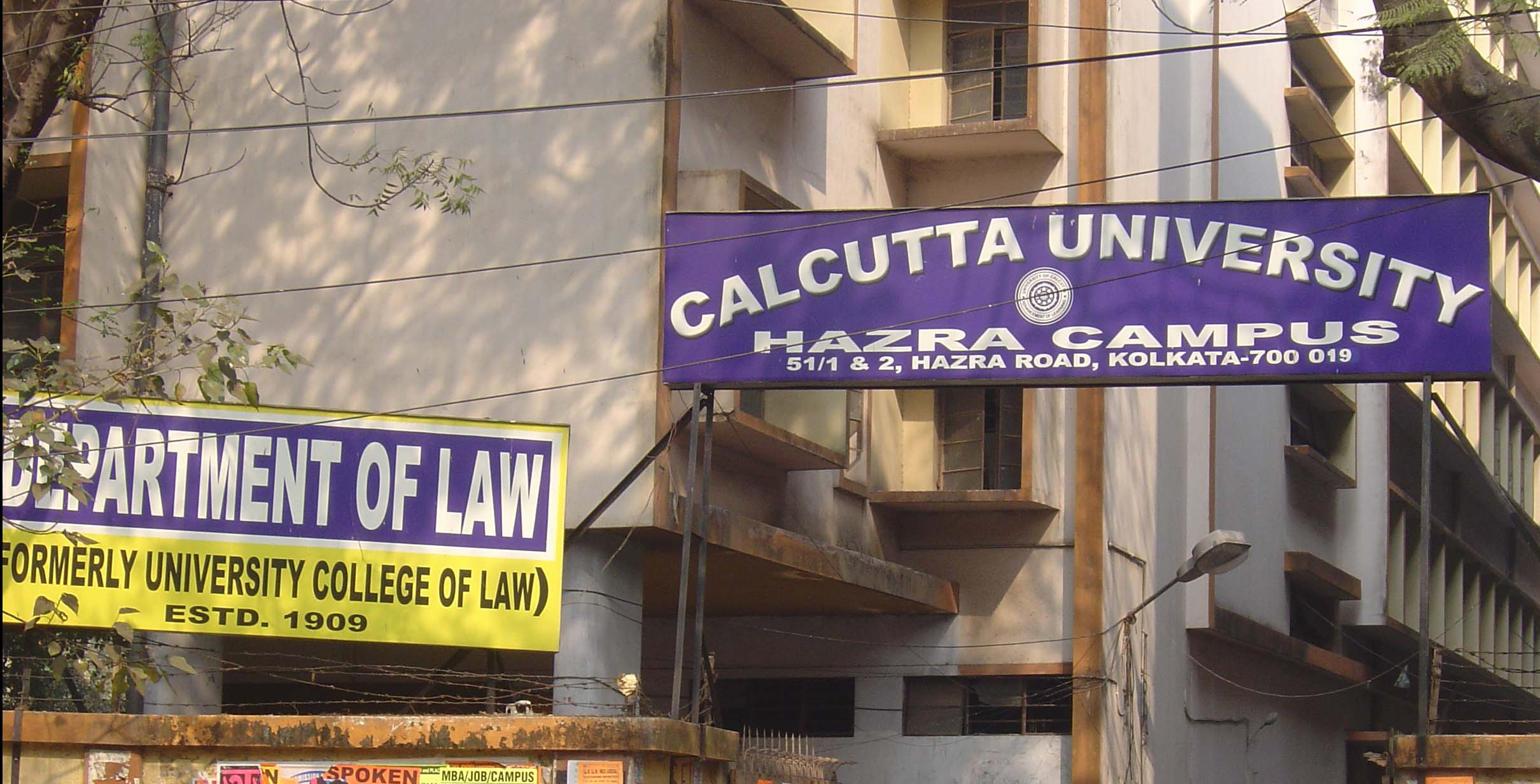 Calcutta University, Hazra Campus